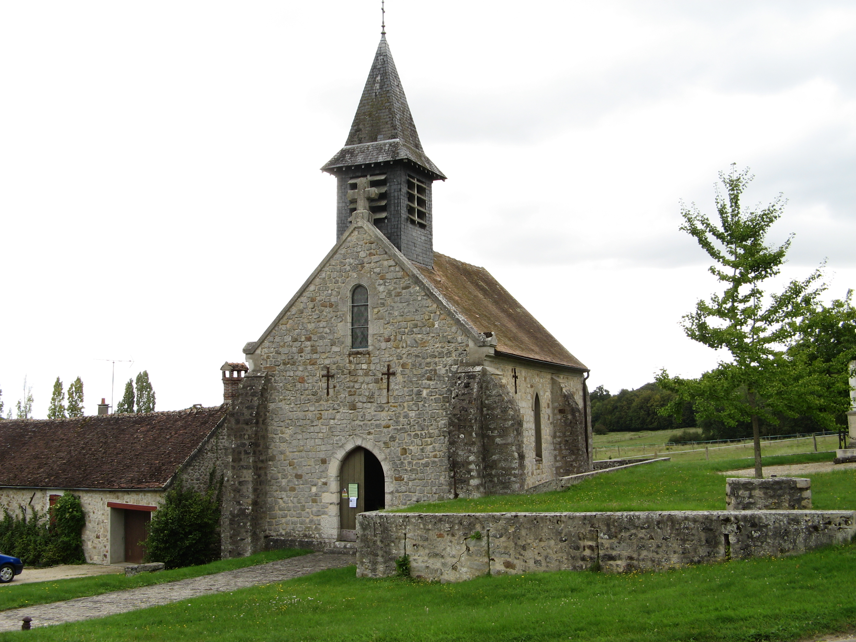 Eglise de Saint-Ange-le-Viel, France.